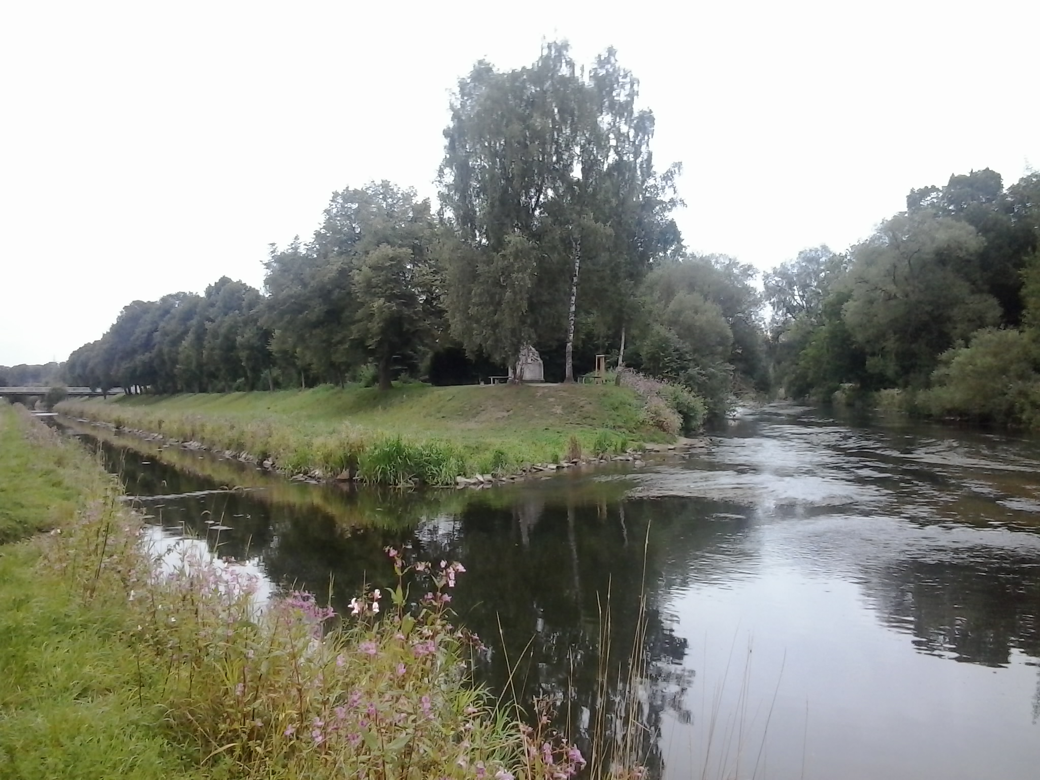 Zusammenfluss von Brigach und Breg zur Donau